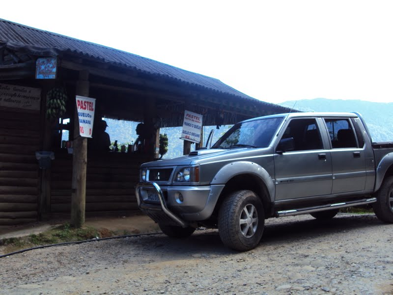 Único quiosque de alimentação da Paraty-Cunha.